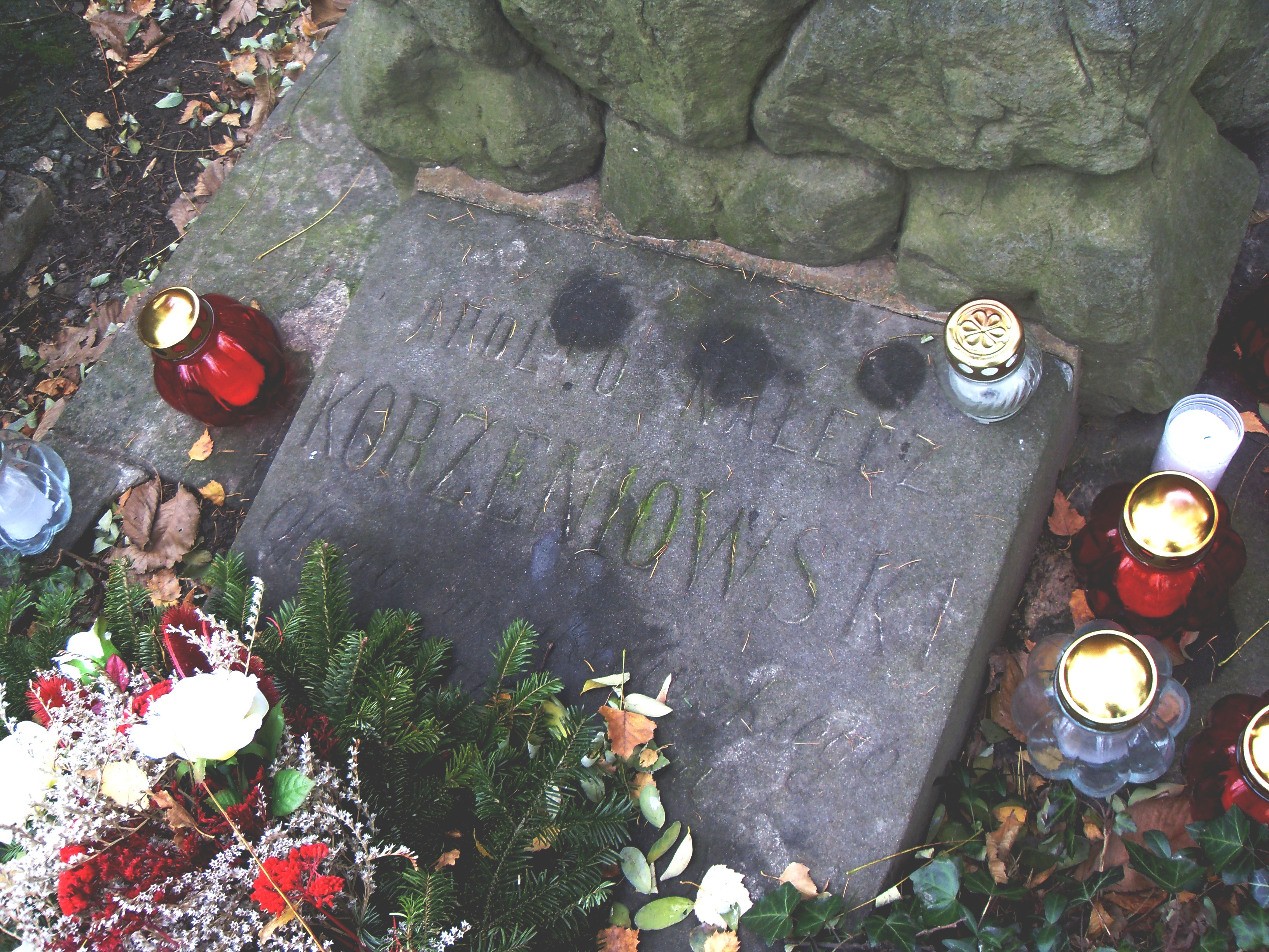 Grobowiec Apolla Korzeniowskiego - ojca Josepha Conrada, Kraków, Cmentarz Rakowicki